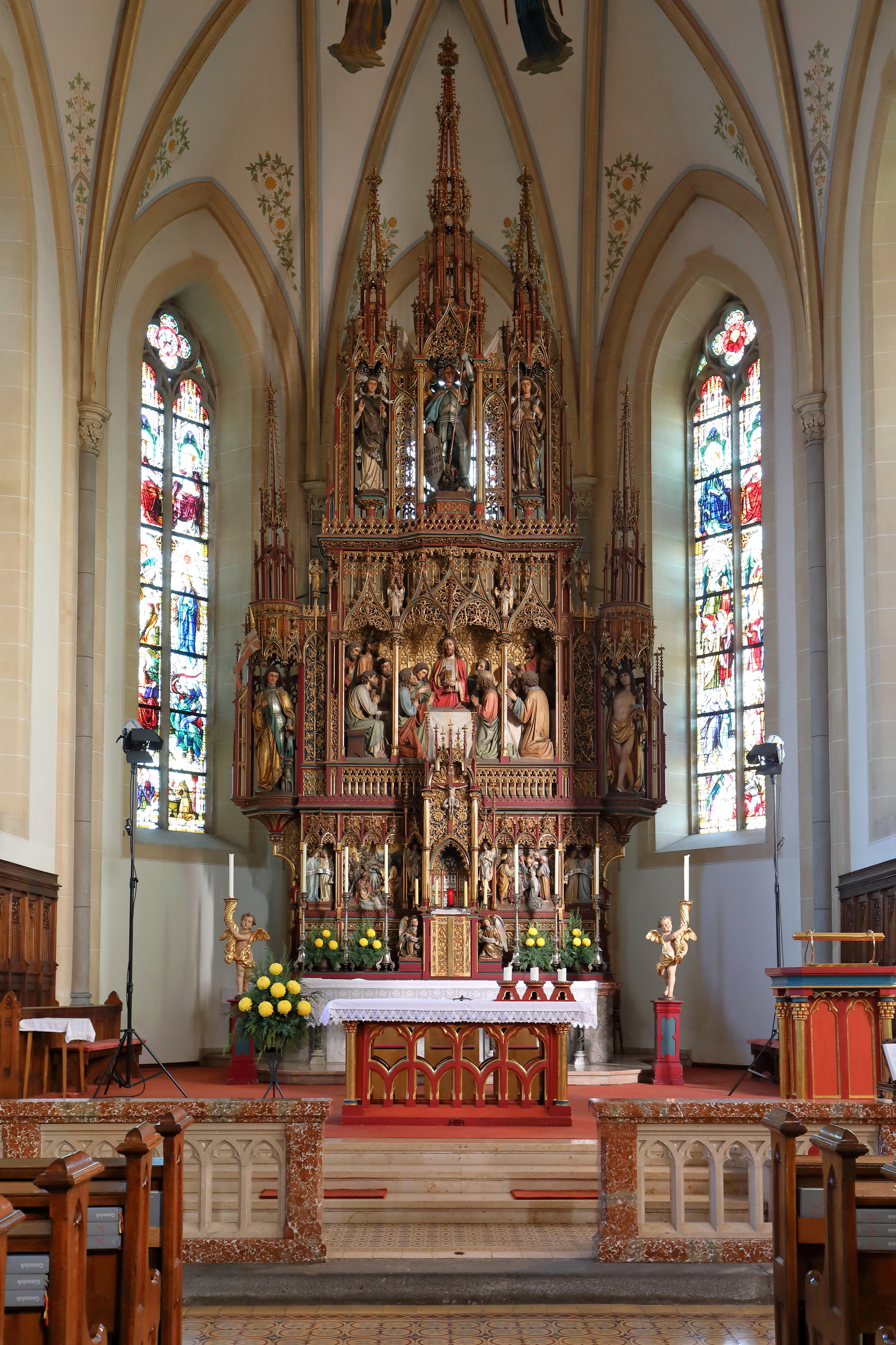 Der Hochaltar der röm.-kath. Stadtpfarrkirche hl. Michael in der oberösterreichischen Stadtgemeinde Schwanenstadt.Der neugotische Hochaltar sowie die andere einheitliche Ausstattung der Kirche wurde von 1902 bis 1907 in der Werkstatt von Ludwig Linzinger geschaffen. Die Kirche selbst mit dem weithin sichtbaren 78 m hohen Kirchturm wurde von 1900 bis 1902 im neogotischen Stil errichtet.